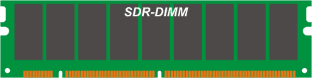 SDR-DIMM-Ram Modul M1:1